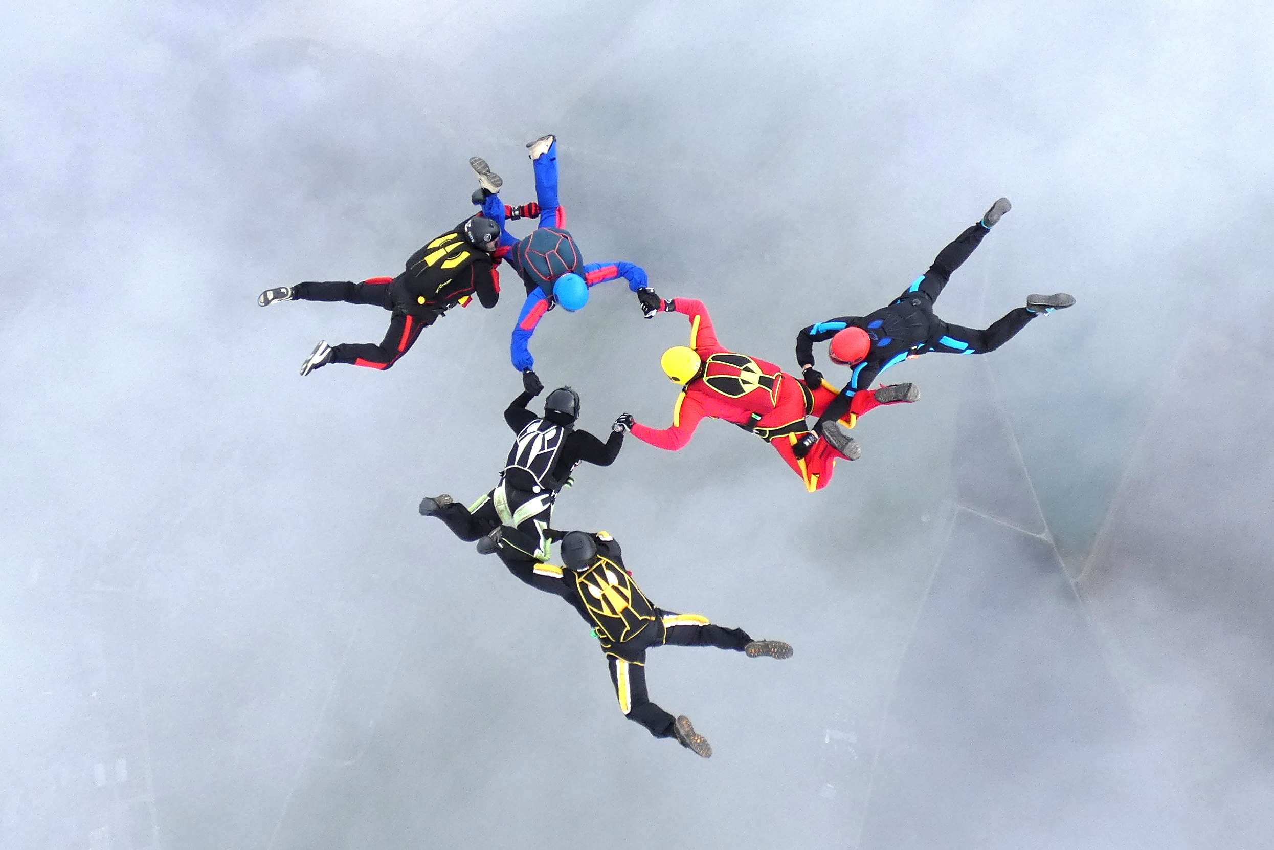 Międzynarodowe Zawody Speed-Star – Prostějov 2017. „Łowcy Szakali”: Jan Isielenis, Danuta Polewska, Leszek Tomanek, Rafał Duda, Grzegorz Polewski, Paweł Mostowski i Wojciech Kielar (kamera) – Sekcja Spadochronowa Aeroklubu Gliwickiego